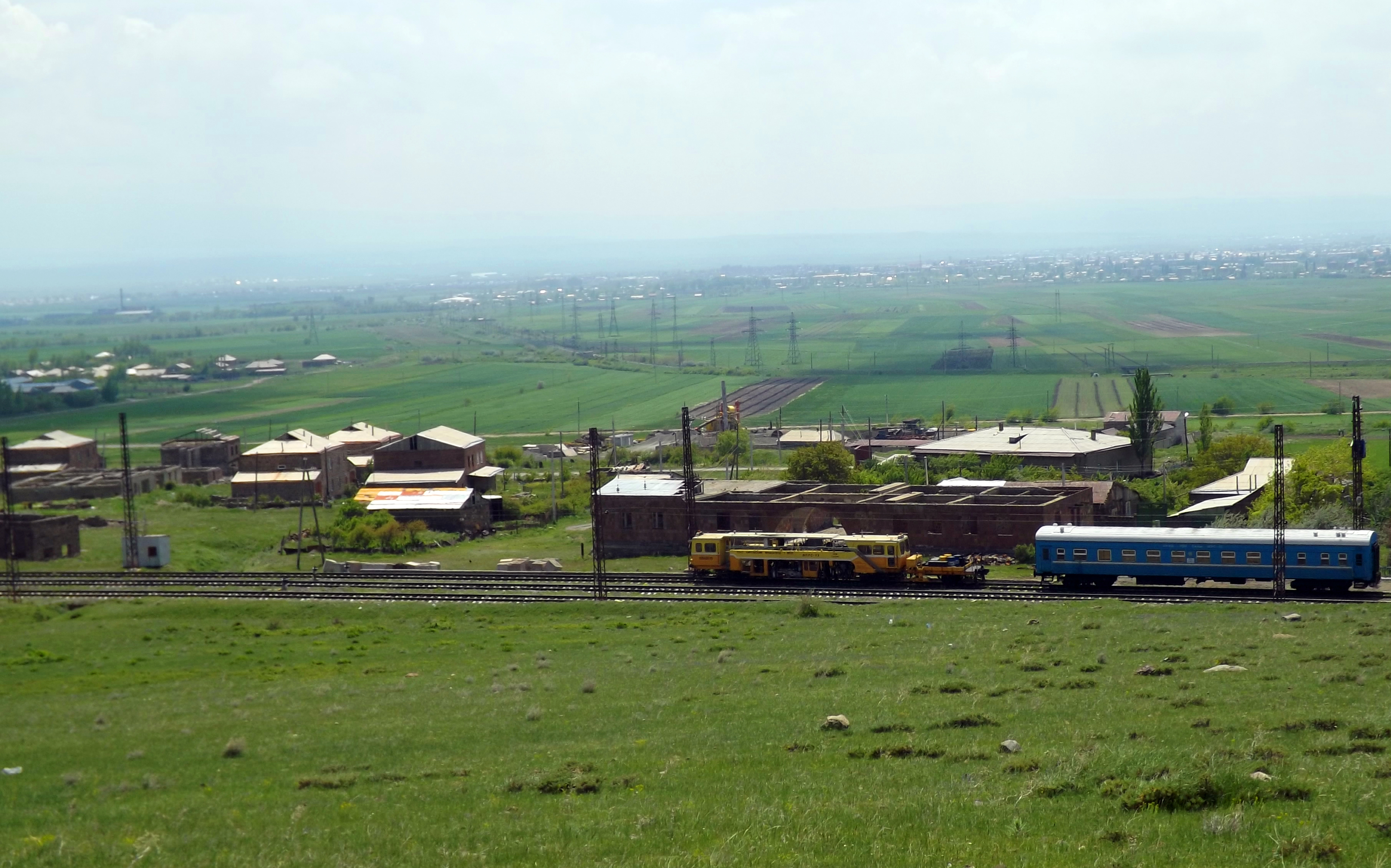 Գյուղ Հայաստանում, Շիրակի մարզում